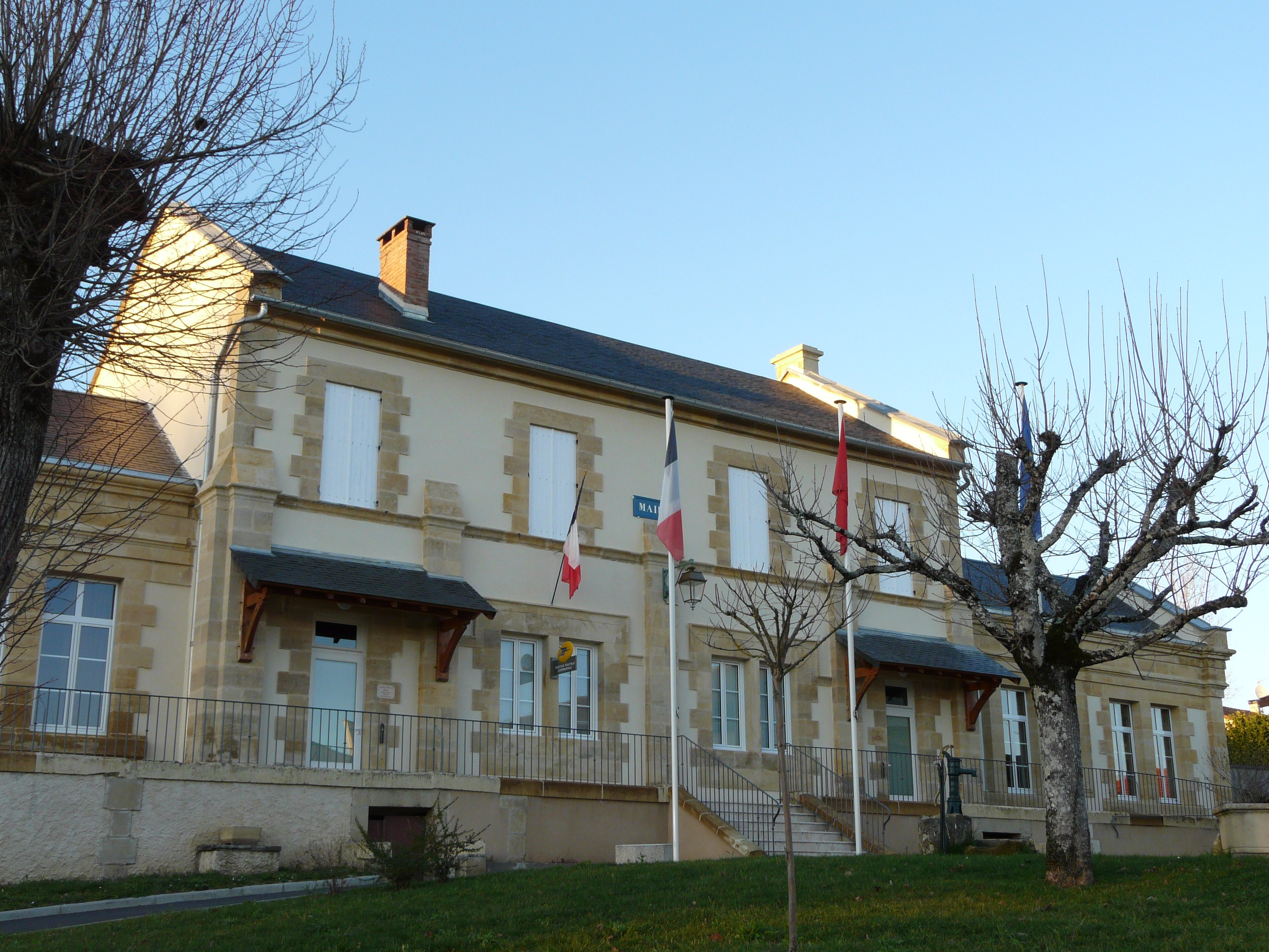 La mairie de Saint-Martial-d'Albarède, Dordogne, France.